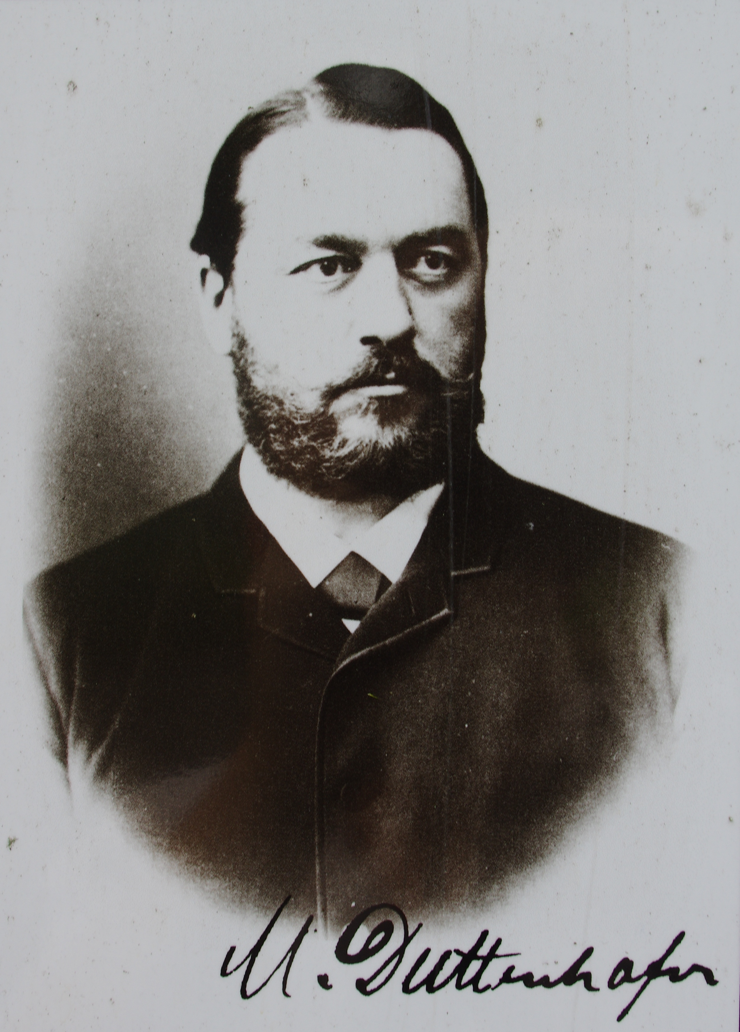 Max Duttenhofer, Fotografie auf einer Informationstafel auf dem Werksgelände, gekenzeichnet "um 1875"